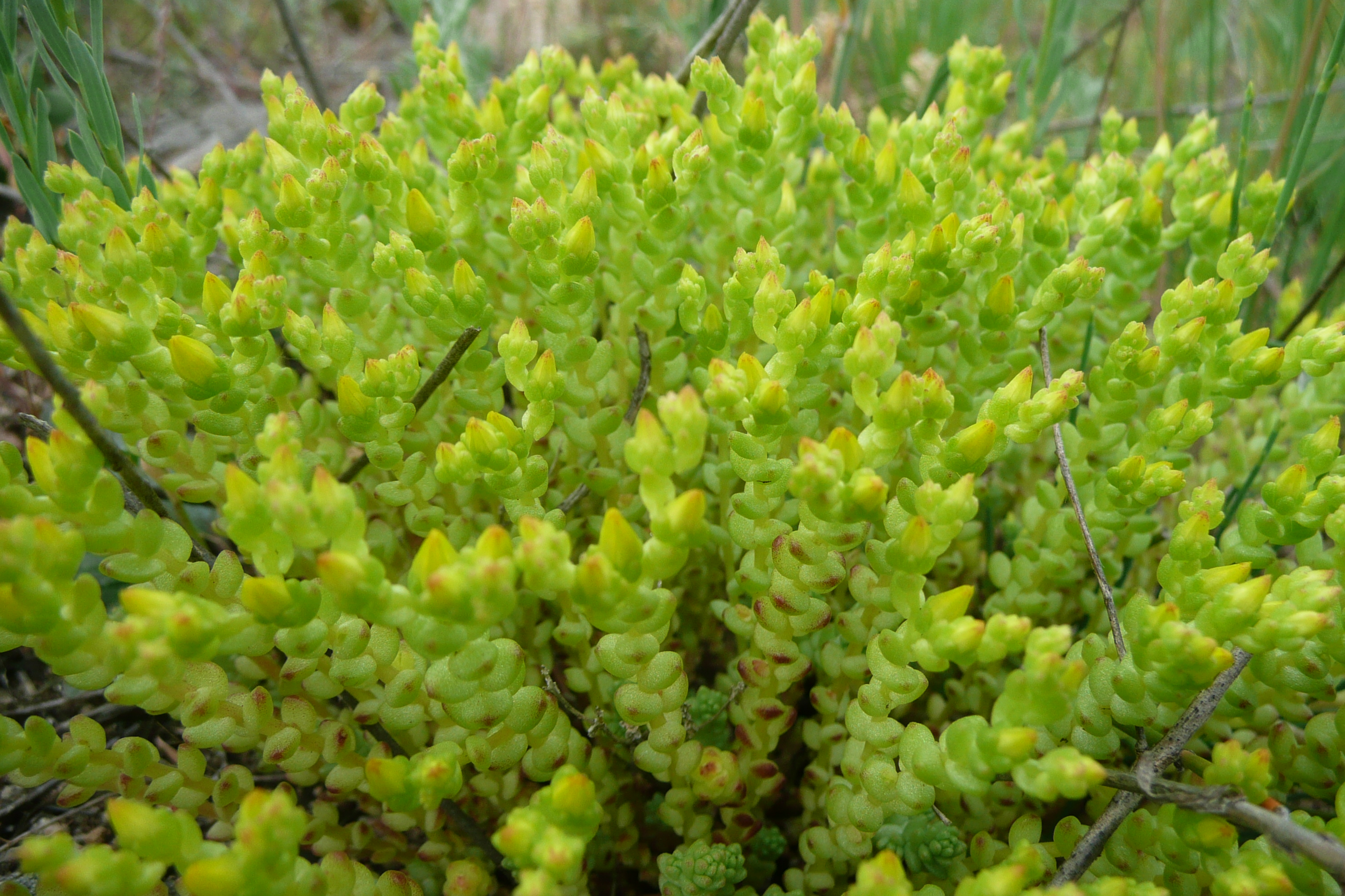 Кальмиусский заповедник